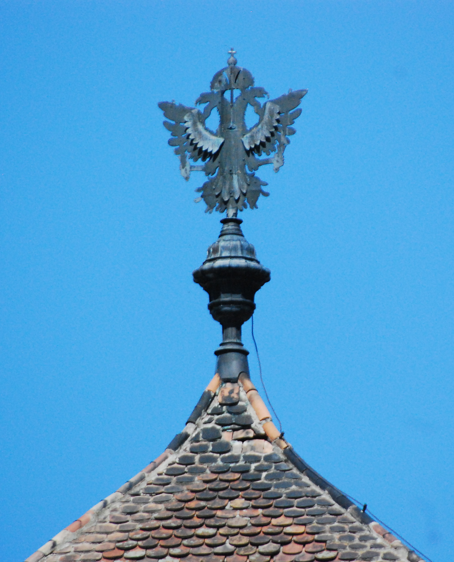 Turmspitze vom Znaimerturm in Retz in Niederösterreich